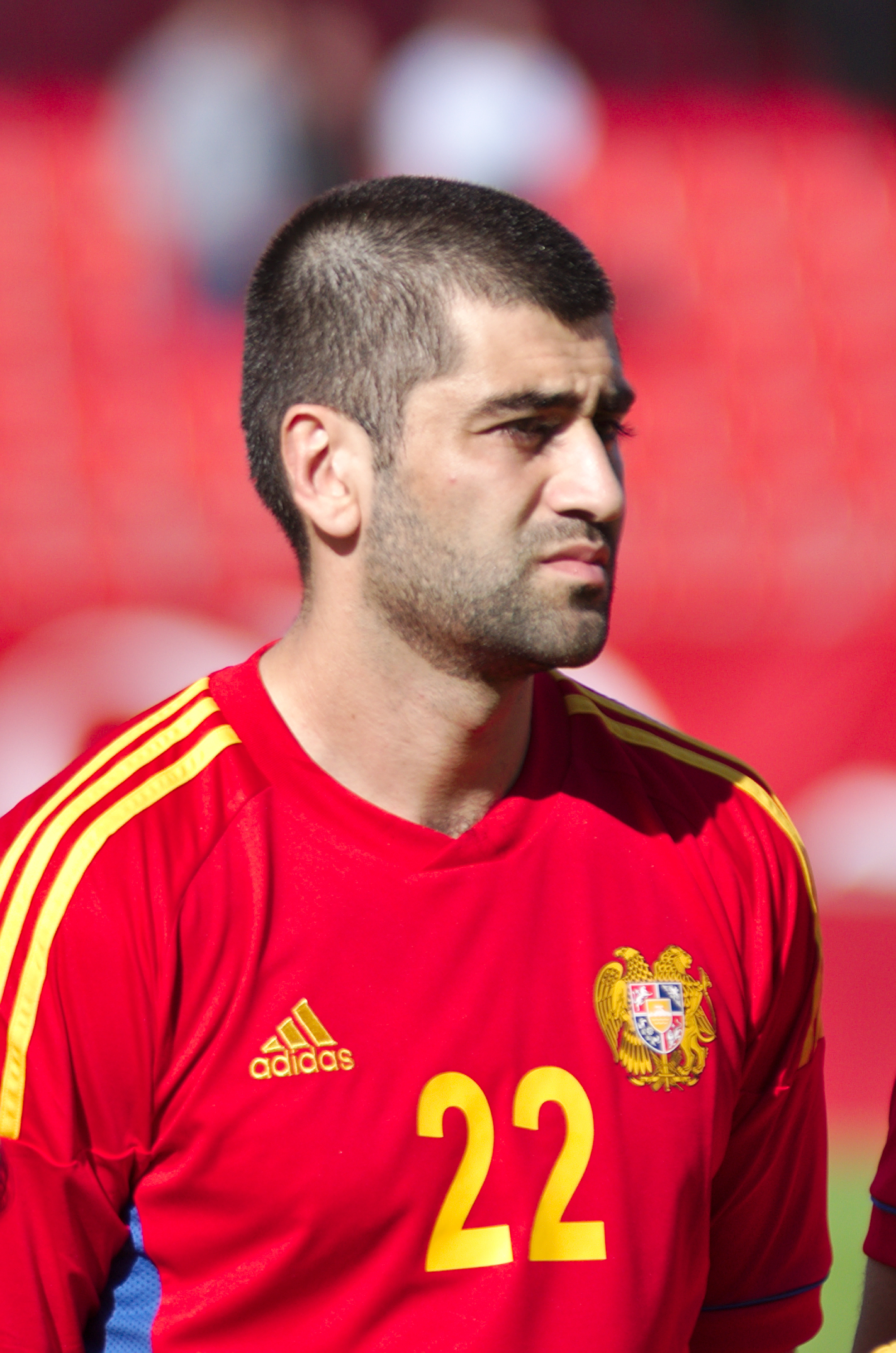 Algérie - Arménie - 20140531 - Edgar Manucharyan